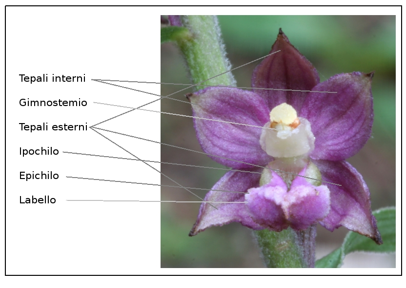 Epipactis atrorubens